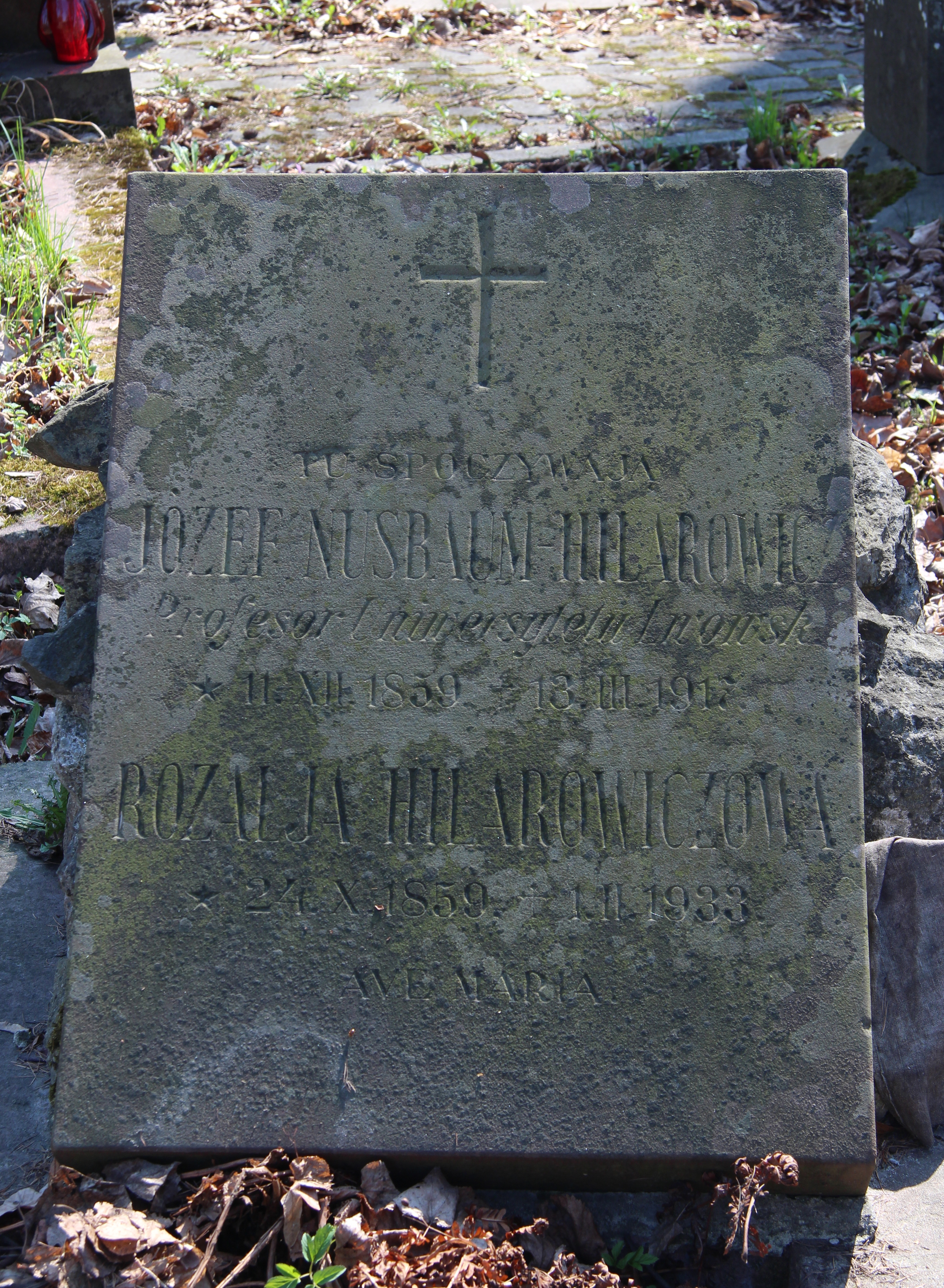 Надгробок на могилі Й.Нусбаума-Гіляровича.Личаківський цвинтар , поле № 4.